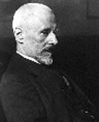 Rudolph Wegscheider, chemist (1859-1935)